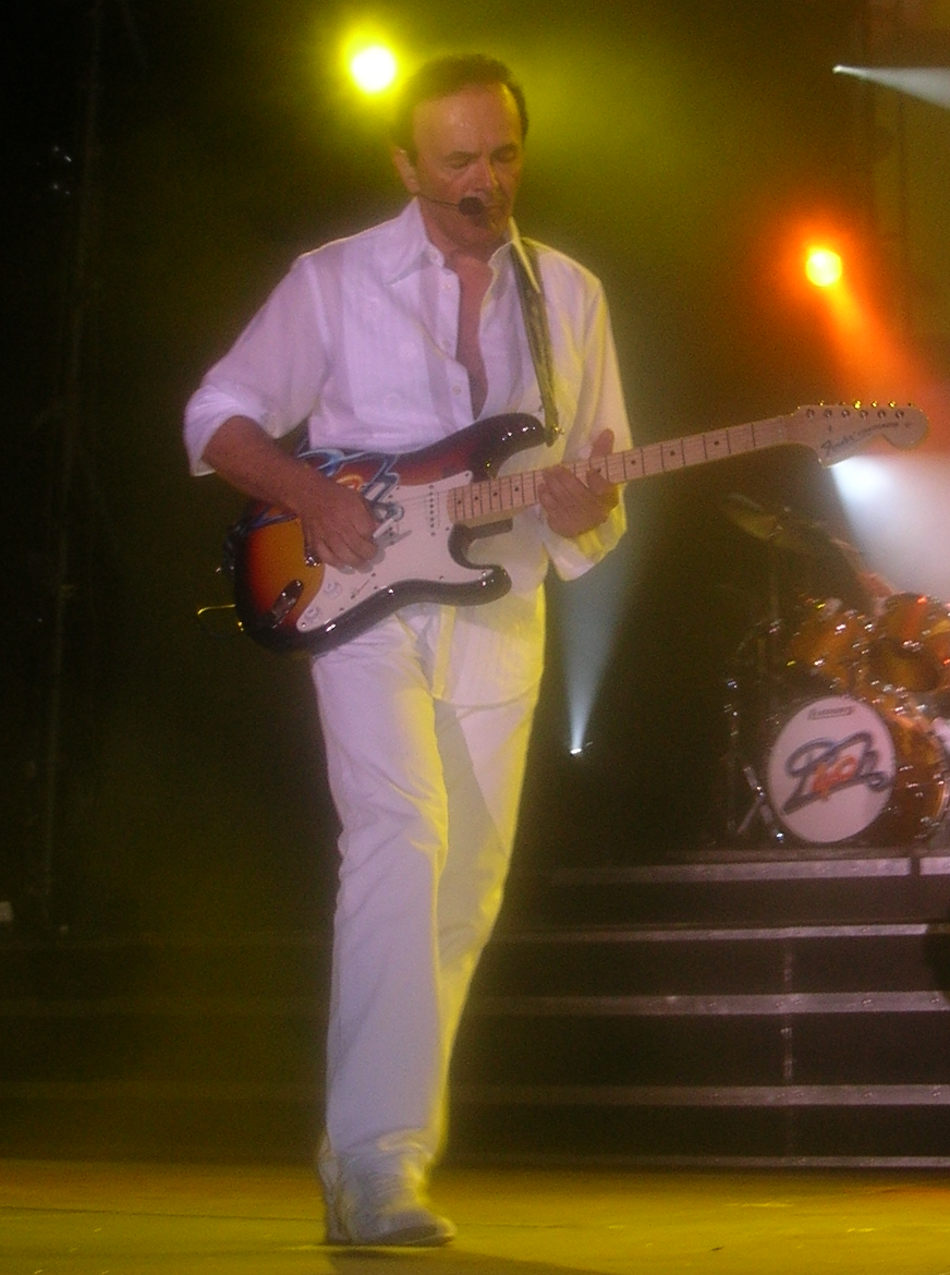 Dodi Battaglia durante il concerto del tour "La Grande Festa" a Catanzaro nel 2006